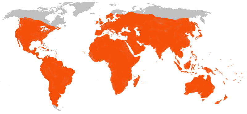 Mapa de distribución del genero Myotis